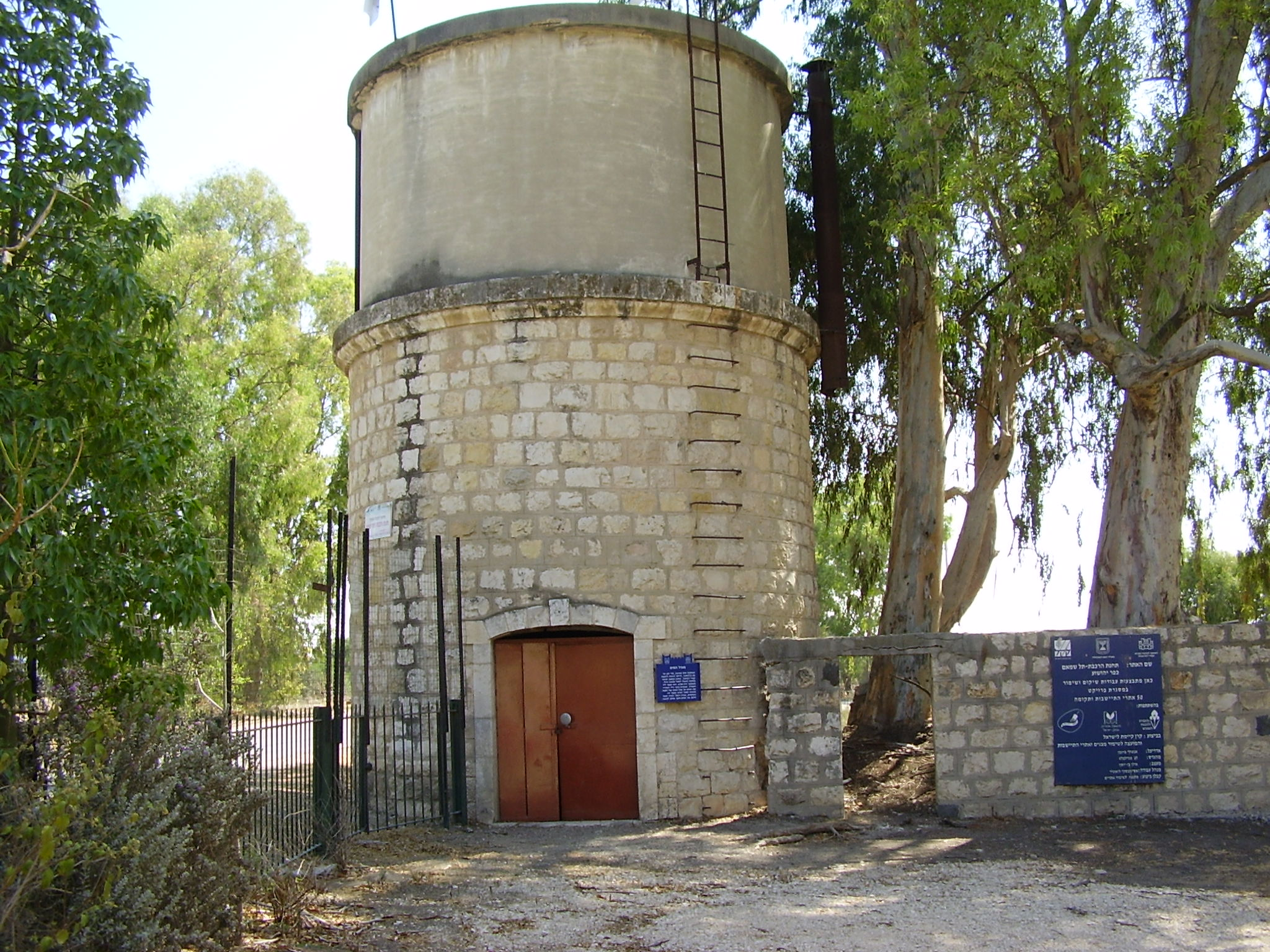 מגדל המים בתחנת רכבת העמק בכפר יהושע